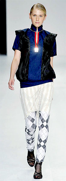 Celina Locks no desfile da Halleck, Fashion Rio - Inverno 2009